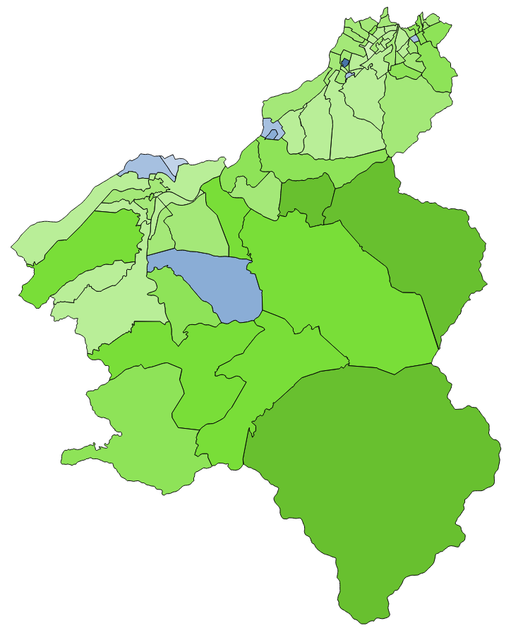 顏色對照表